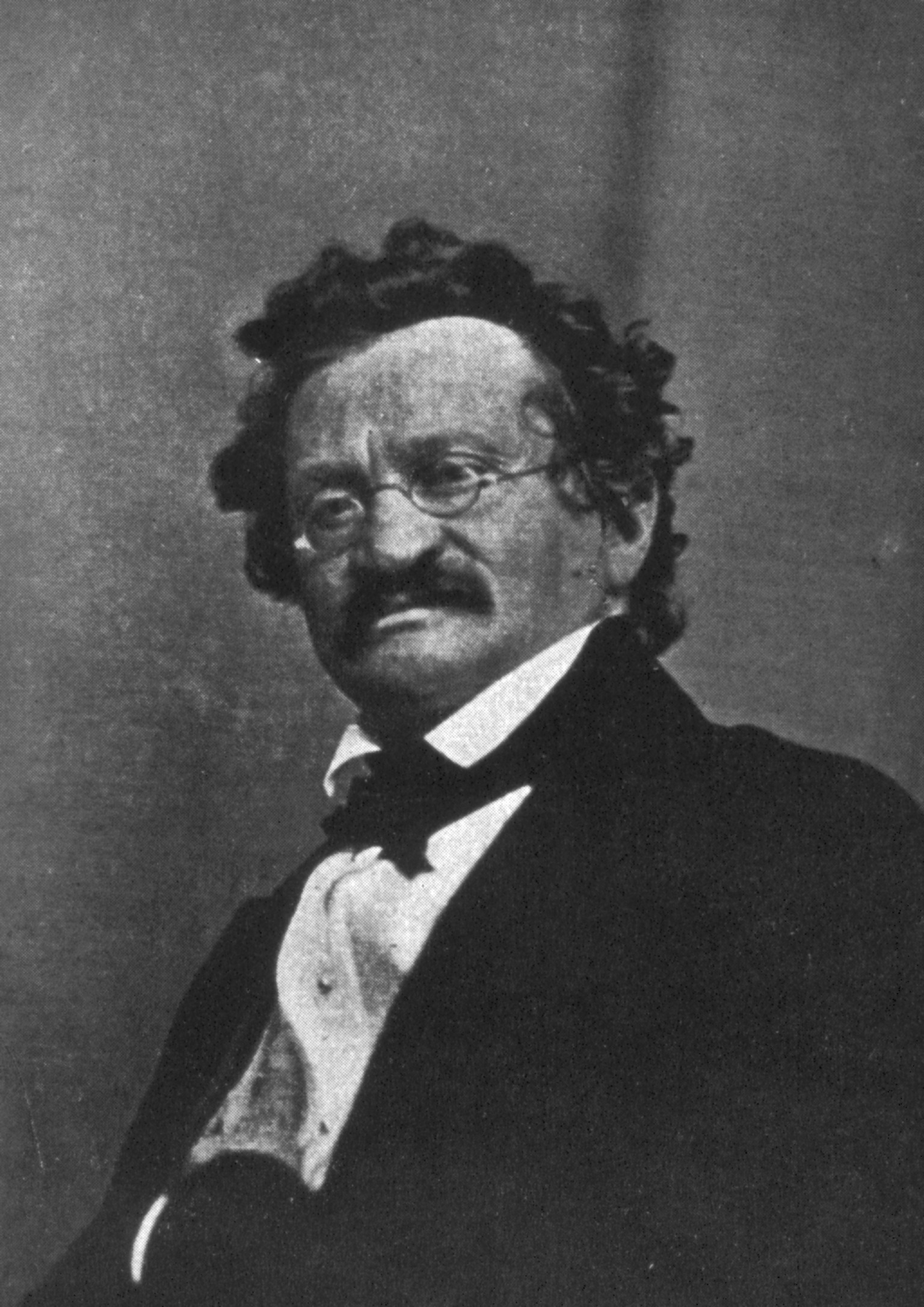 Porträt des Journalisten Moritz Gottlieb Saphir (1793-1858)